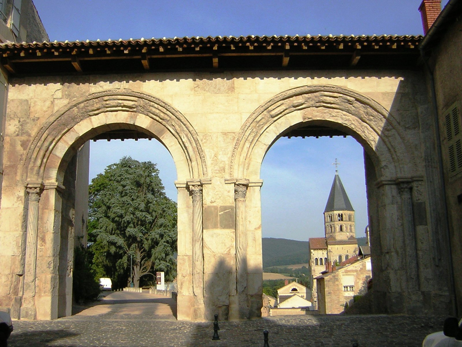 Cluny, la porte d´entree du monastere)